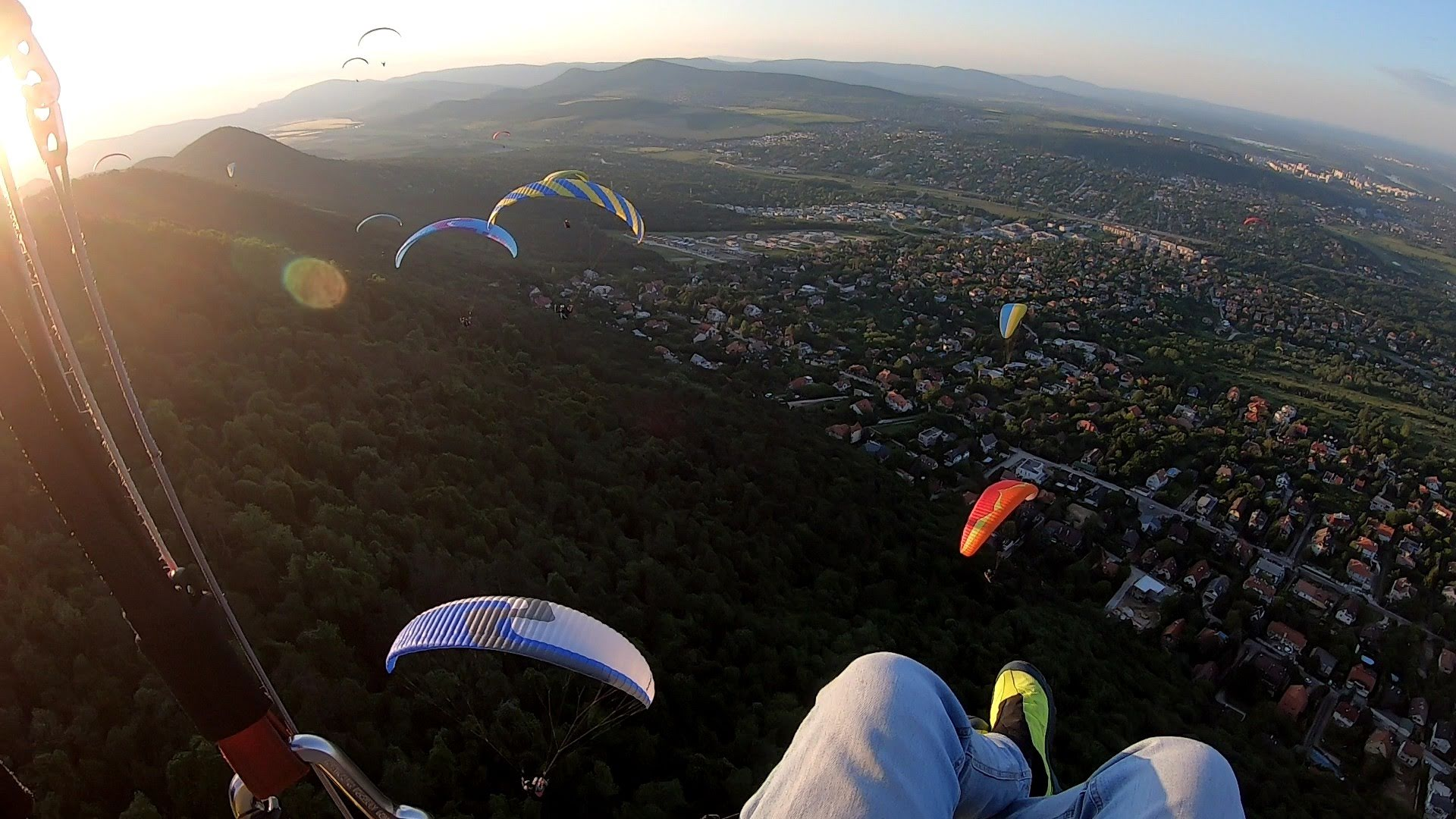 A fényképen több mint egy tucat siklóernyős pilóta látható, akik 2019 júniusában lejtőznek a Hármashatárhegy felett a naplementében - az egyik siklóernyős szemszögéből.